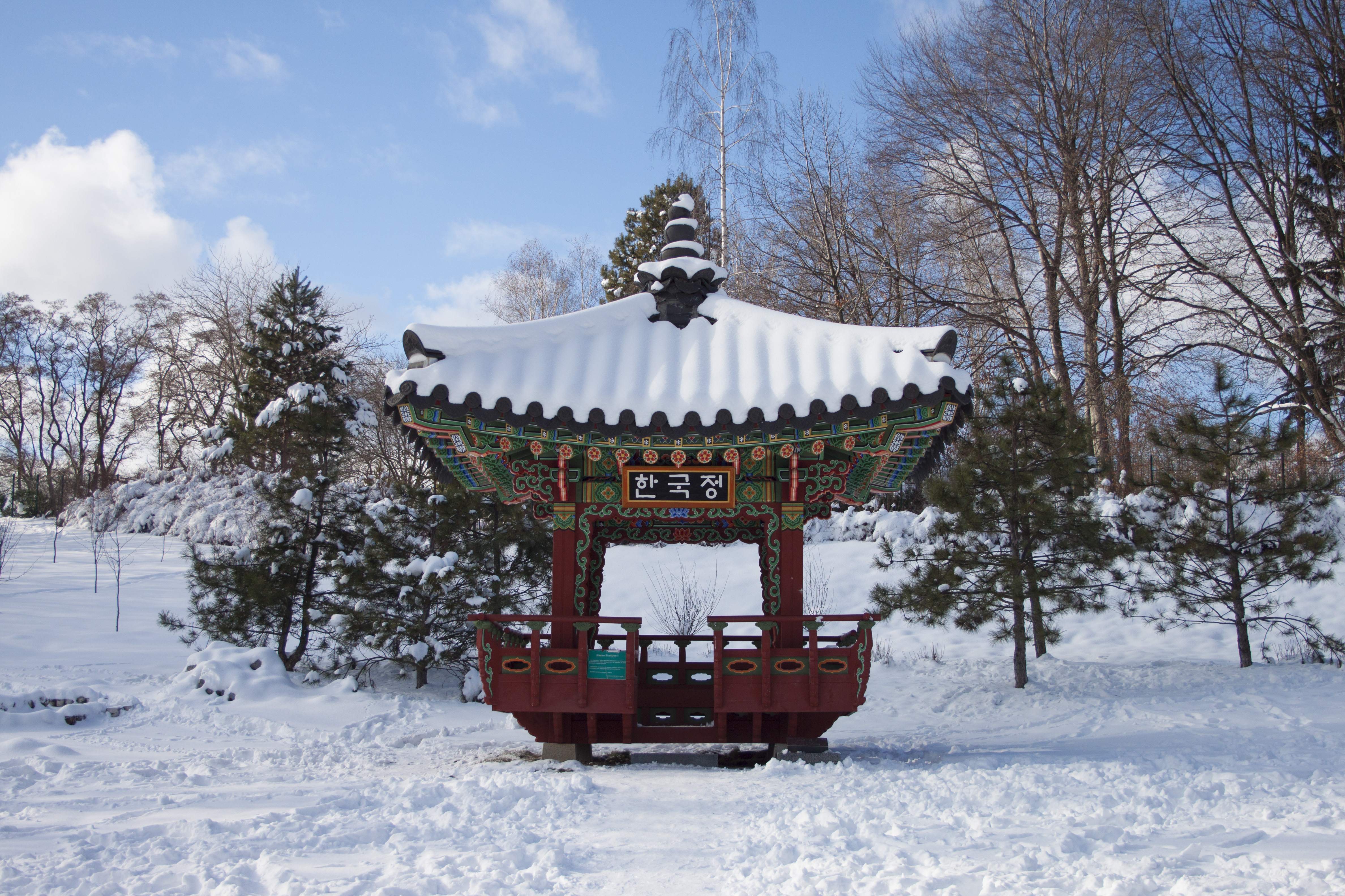 Національний ботанічний сад ім. М.Гришка, Печерський район